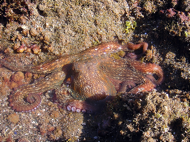 Pulpo